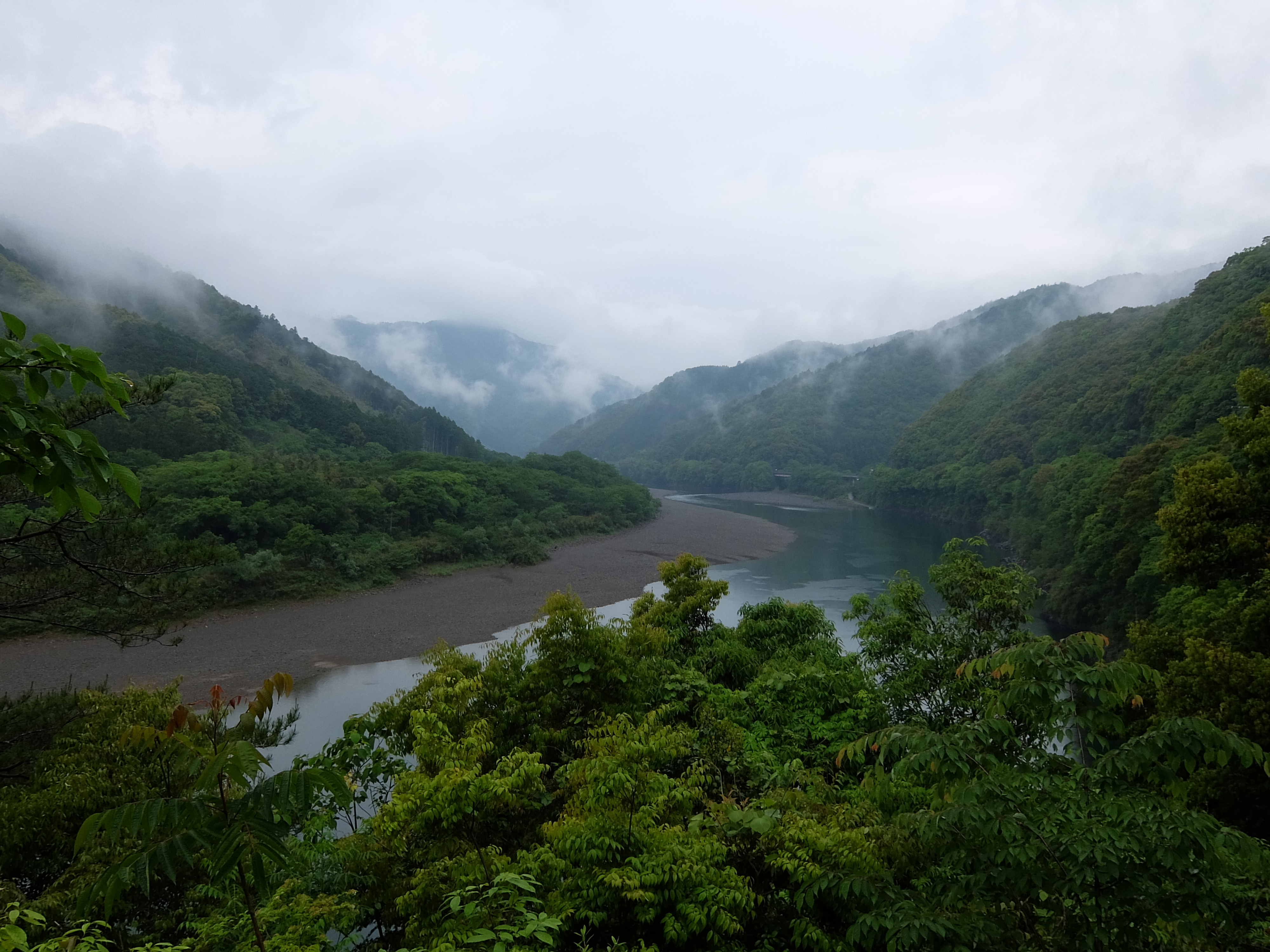 四万十川 半ば休憩所からの眺望